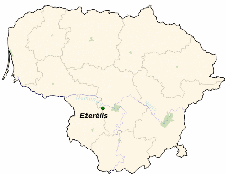 Žemaitėška: Žemielape autuorios User:Knutux; iš lietovėškas vikipedėjės